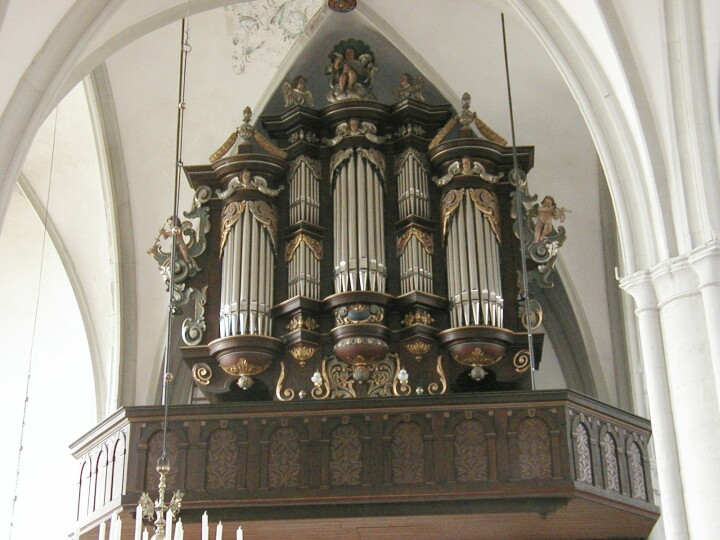 Die Walcker-Orgel in der Paulikirche (1895, Gehäuse von 1675)